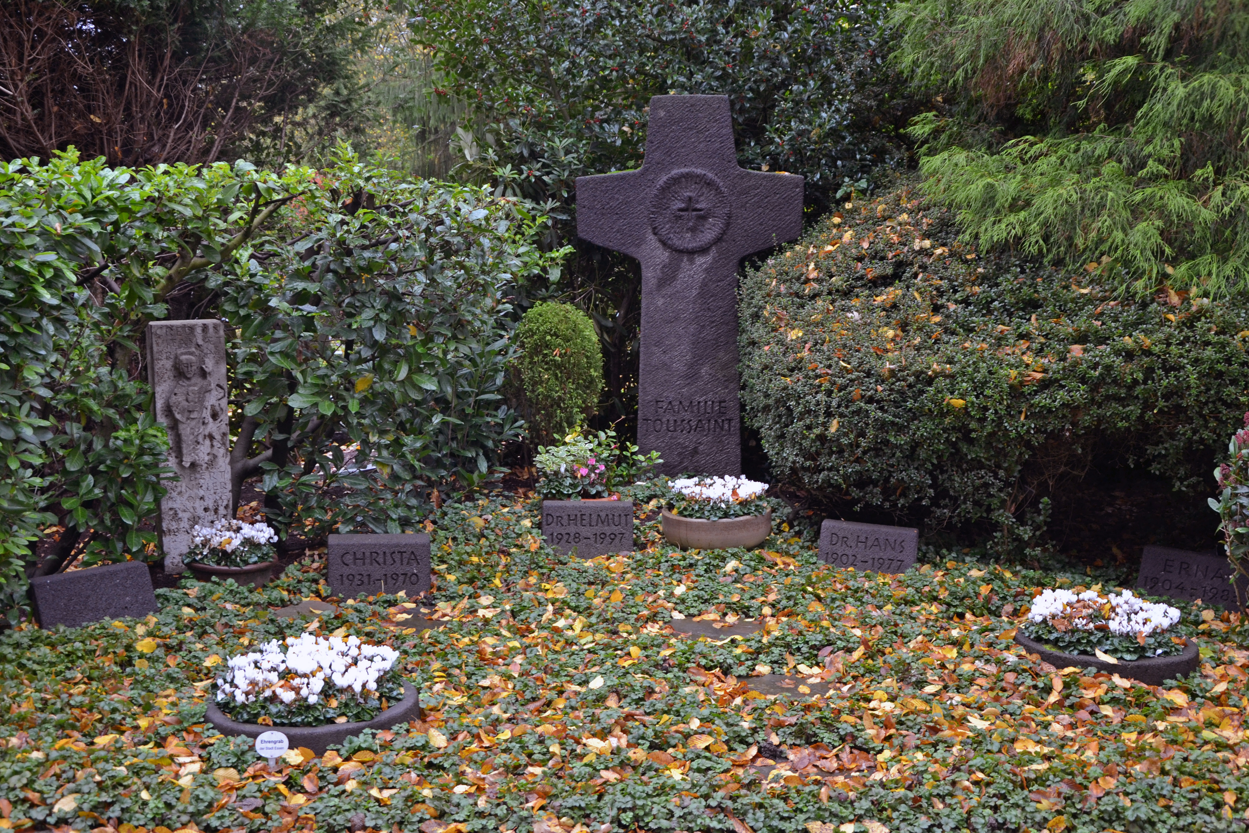 Friedhof Essen-Bredeney, Grabmal Familie Toussaint, Hans Toussaint war Oberbürgermeister von Essen